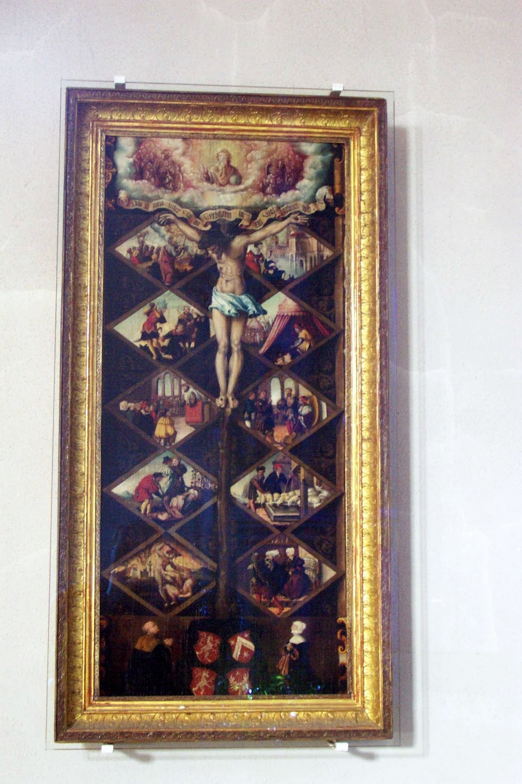 Pfarrkirche St. Johannes in Wirsberg: Ölgemälde "Gnadenstuhl" mit fünf alttestamentlichen Szenen in Rauten, bezeichnet 1539. Stil und Farbigkeit erinnern an den Umkreis von Lukas Cranach